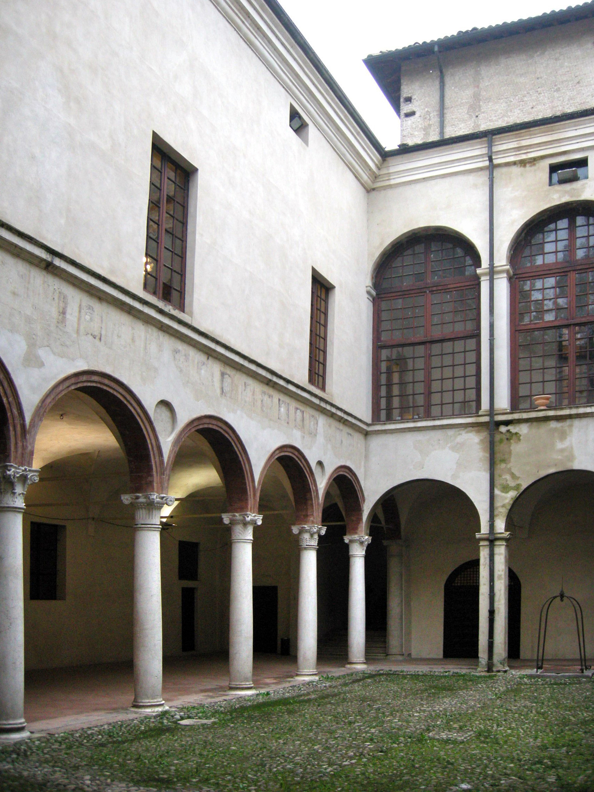 Rocca dei rossi di san secondo